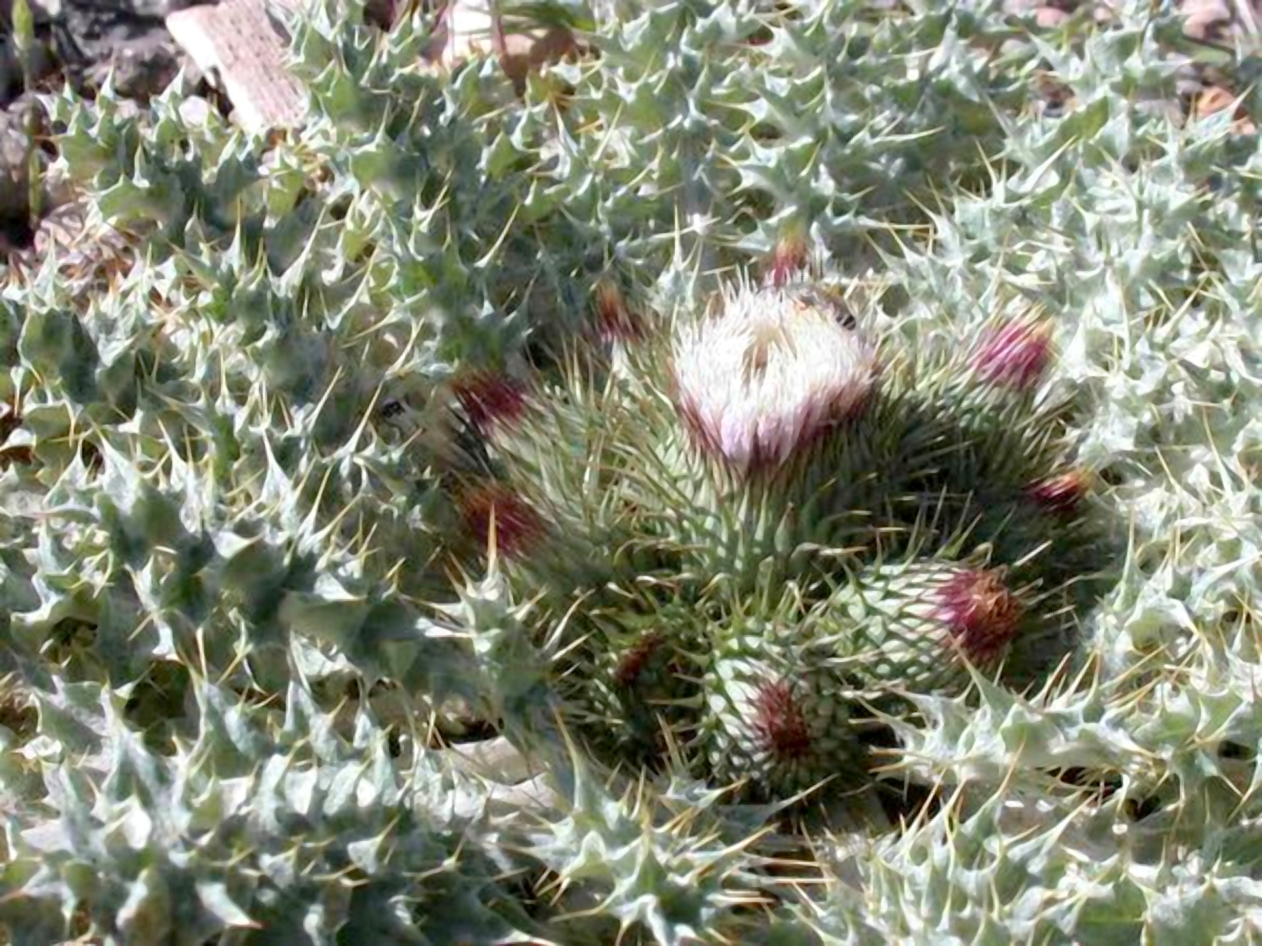 Onopordum acaulon - Senoual (Marruecos).